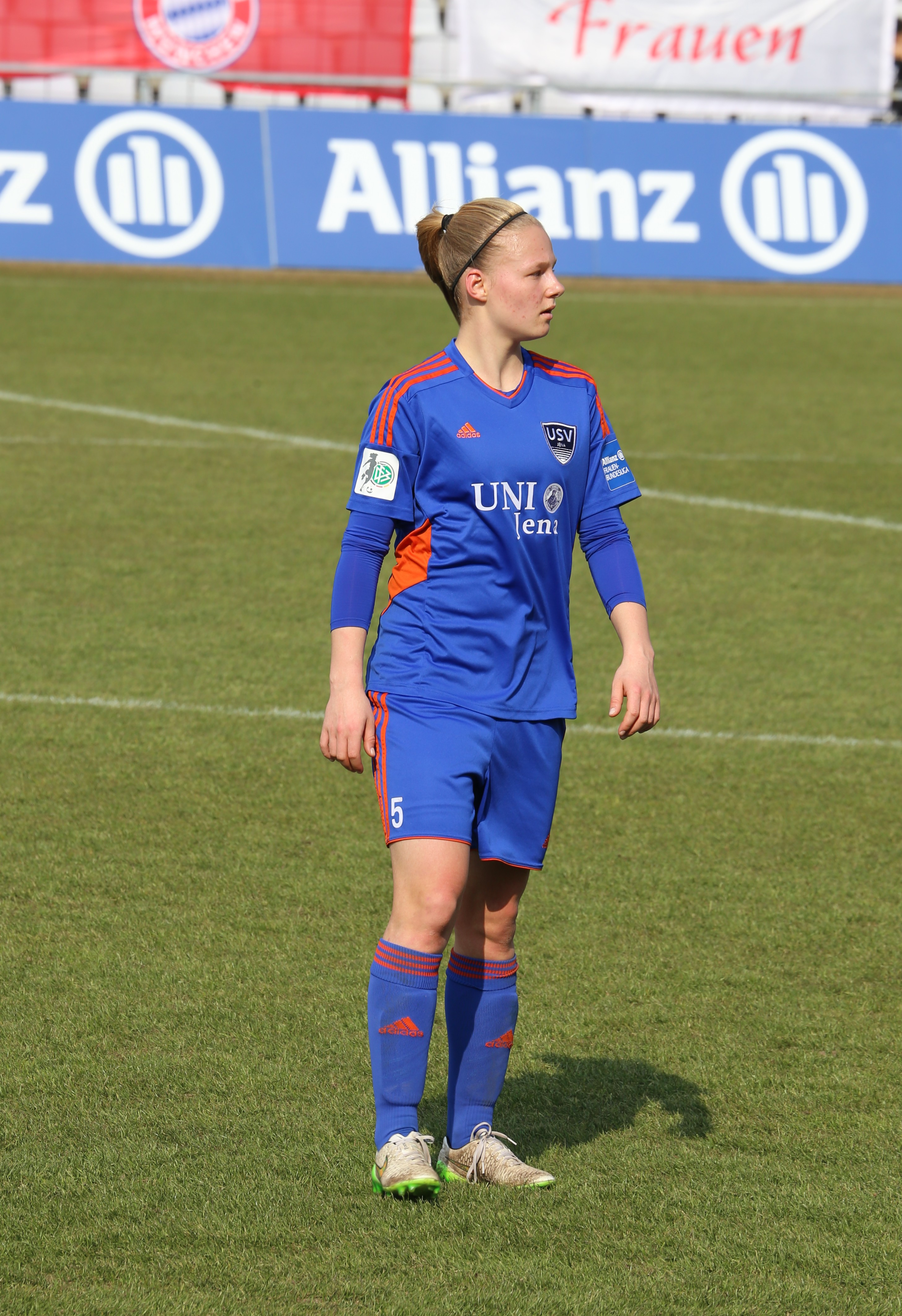 Annalena Breitenbach (FF USV Jena) beim Frauen-Bundesliga-Spiel FC Bayern München gegen FF USV Jena am 19. März 2016 im Stadion an der Grünwalder Straße (Ergebnis war 5:1).